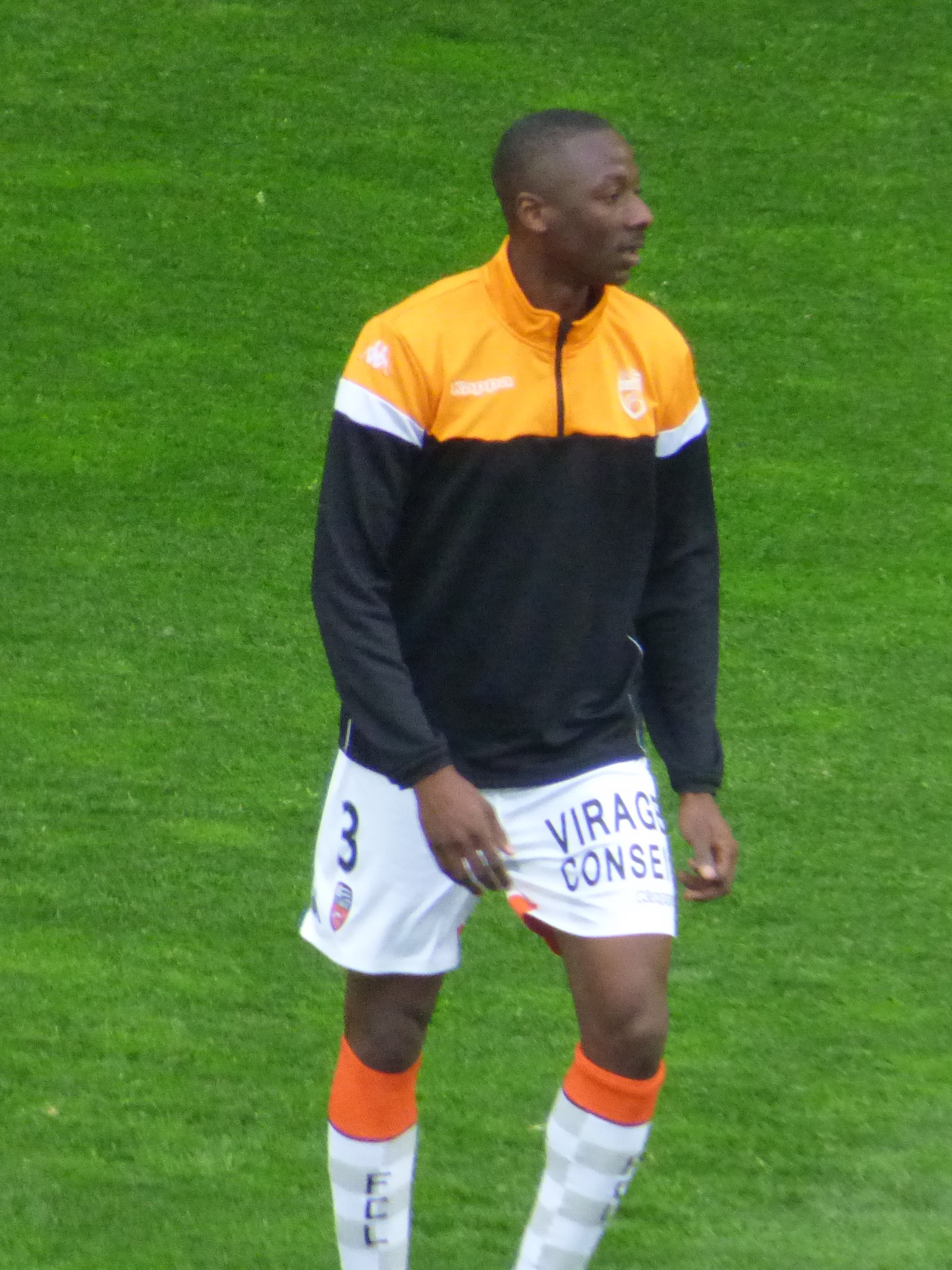 Mamadou Kamissoko avant le match RC Lens / FC Lorient, comptant pour la 34ème journée du championnat de France de Ligue 2 de football 2018-2019, le 23 avril 2019, au Stade Bollaert-Delelis.